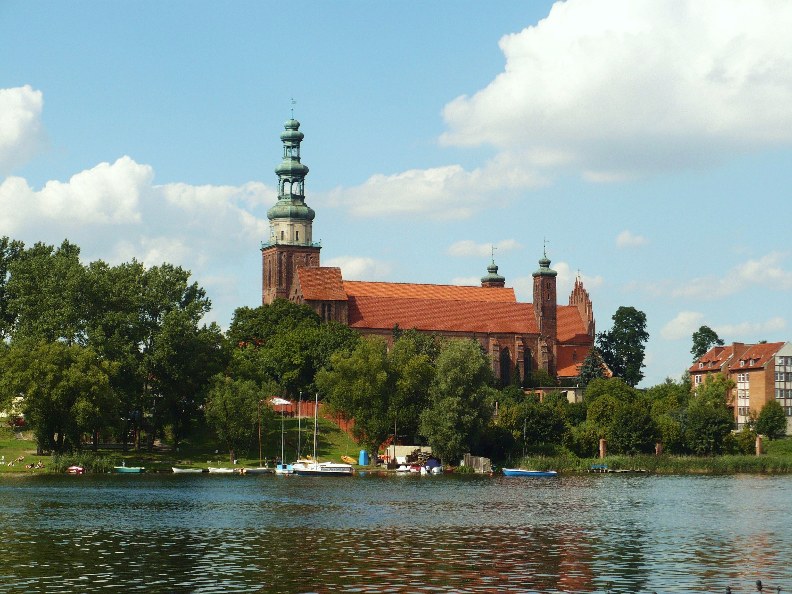 Gotycka konkatedra w Chełmży